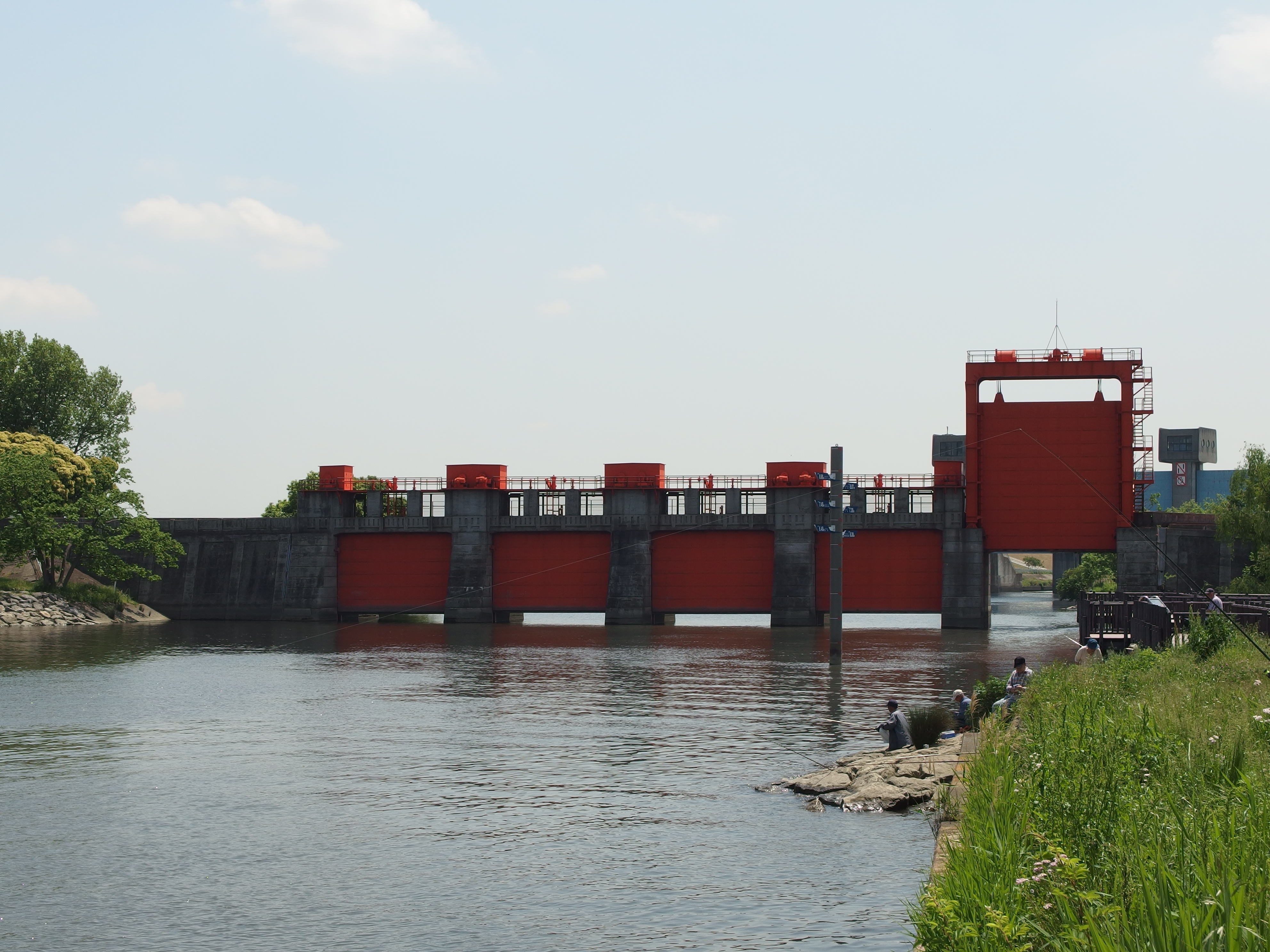 Kyu Iwabuchi Suimon @ Arakawa River @ Akabane